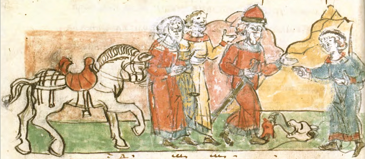 Опис події за 912 рік у Повісті временних літ: «І з коня зліз, посміявшись, каже: «Чи від цього лоба смерть мені прийняти?» І наступив ногою на лоб, і виповзла змія, і вжалила його в ногу, і від того розхворівся і помер. І плакали за ним всі люди плачем великим, і понесли його, і поховали його на горі, яку називають Щекавиця. І є могила його до сьогодні, славна могила Олегова».